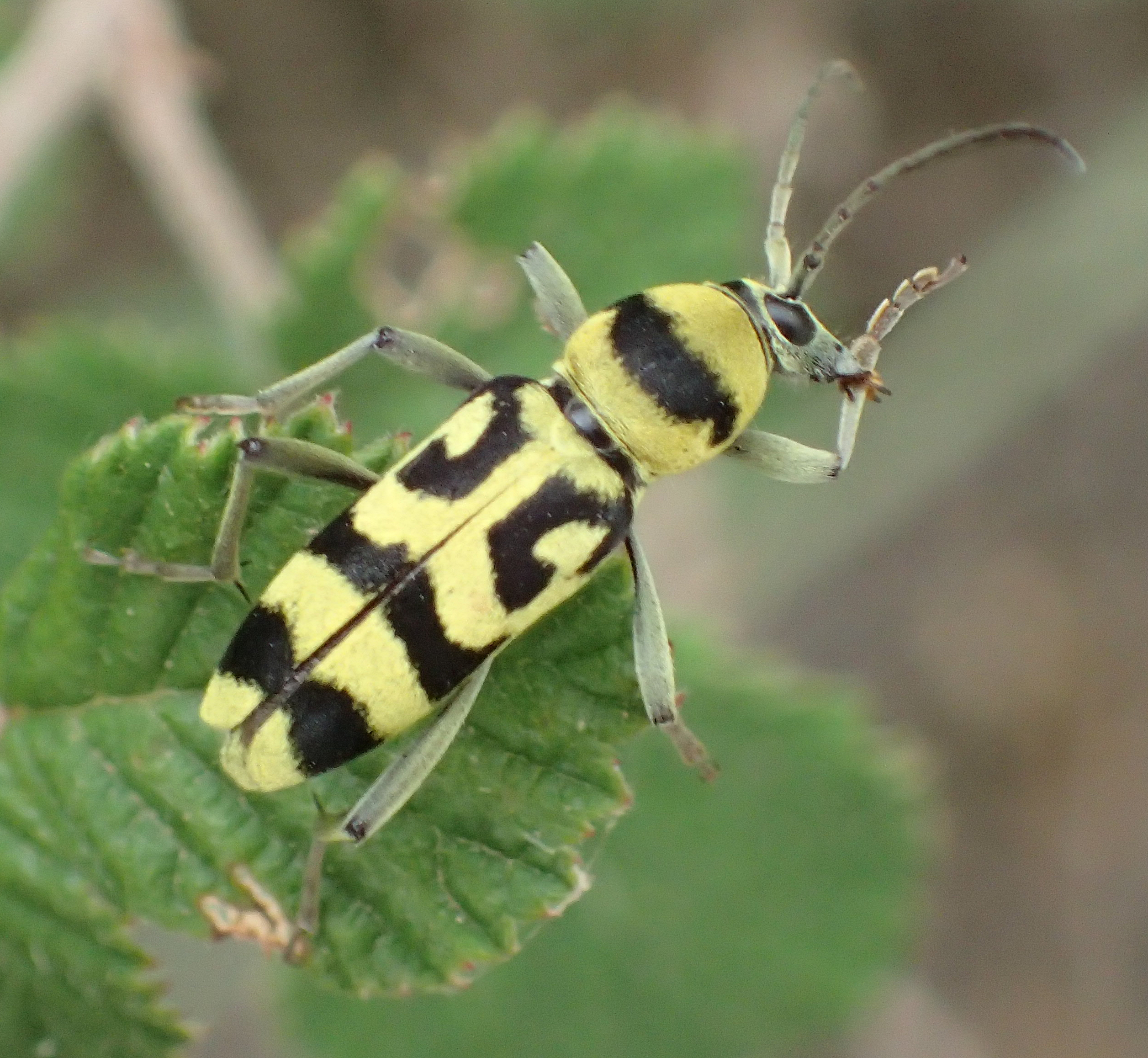 Chlorophorus varius aus Griechenland, Peloponnes, zwischen Areopoli und Githeon, sich putzend